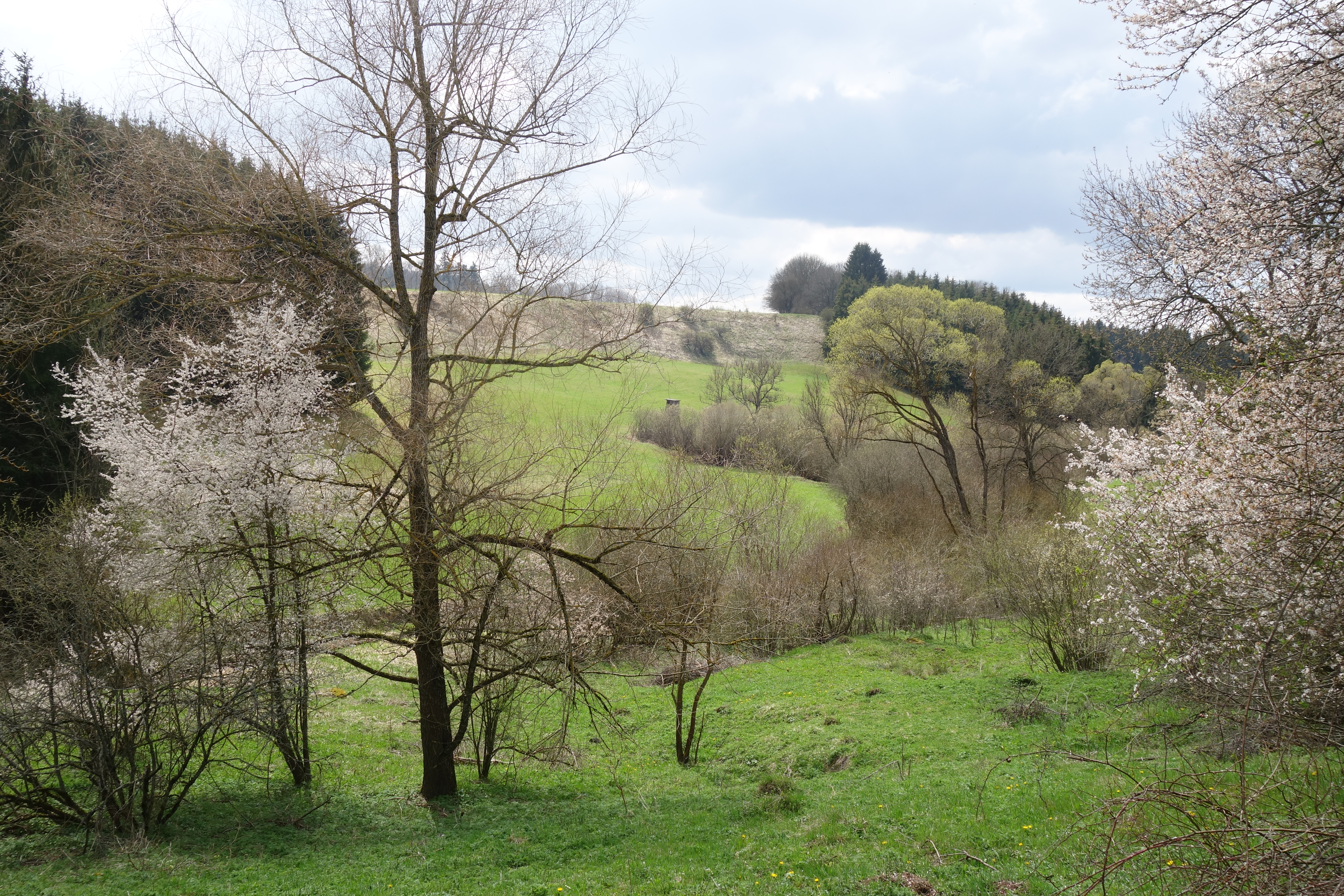 NSG Schwarzenbach